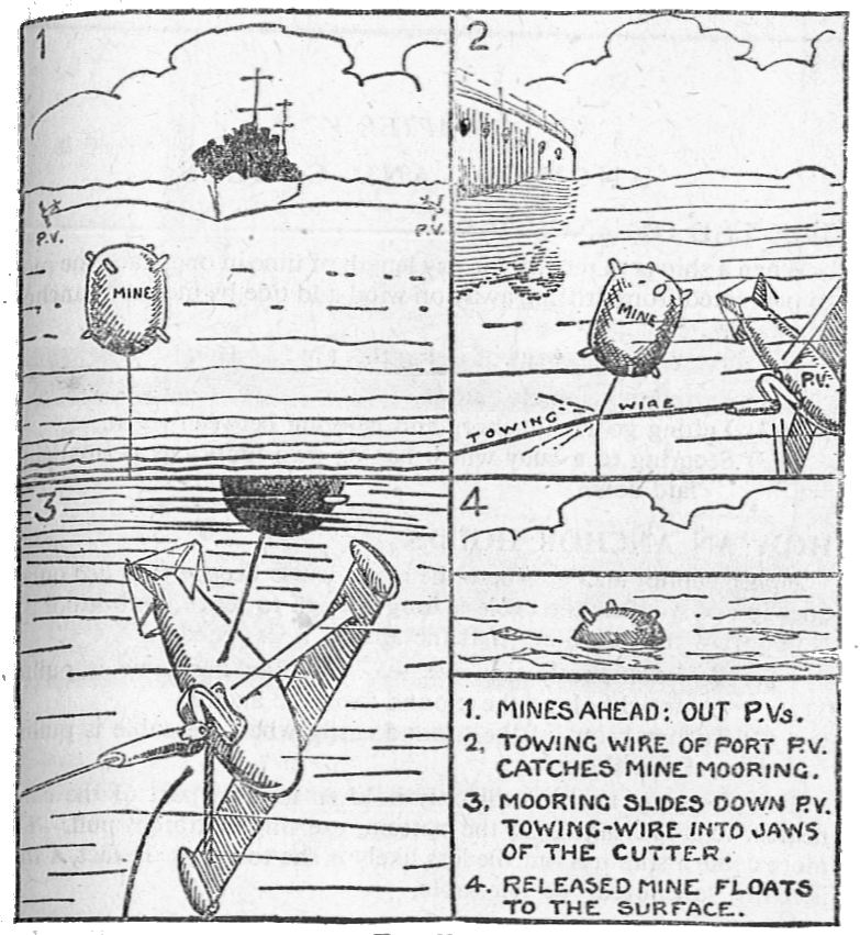 Paravane mine-sweeping (Seaman's Pocket-Book, 1943).jpg